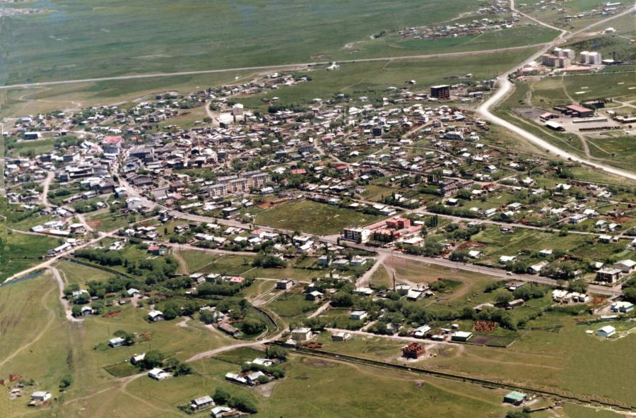 GÖLE Genel görünüm